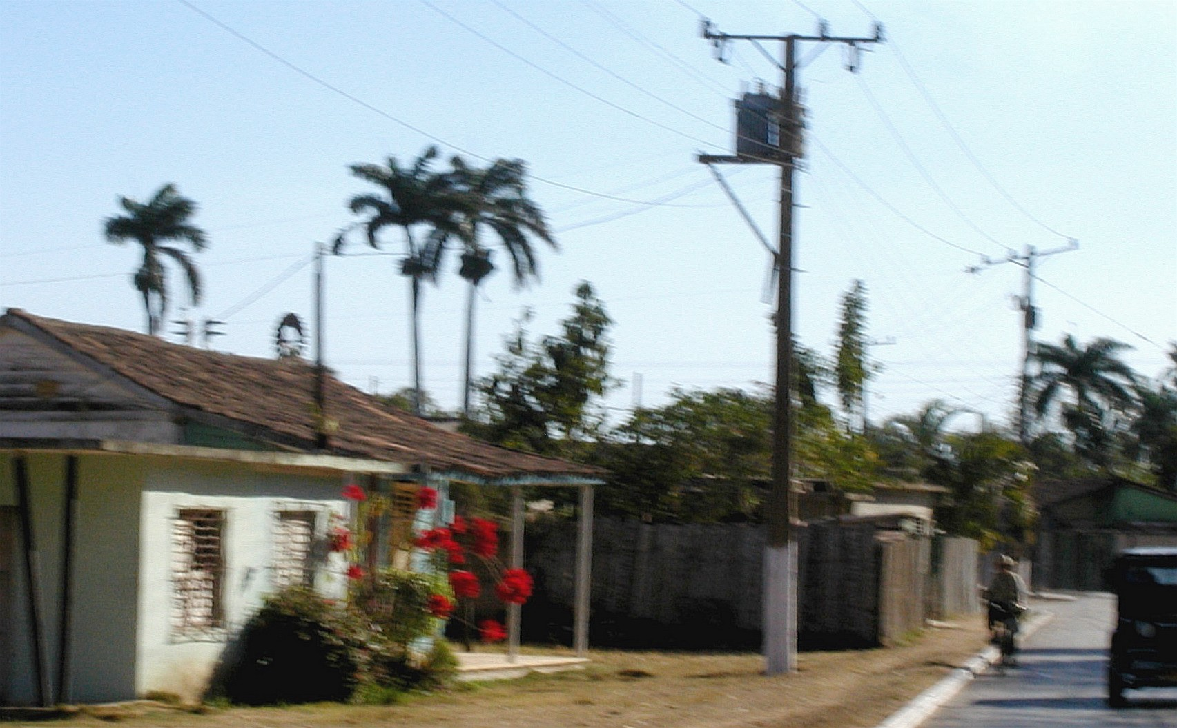 Entrada al pueblo de Guayacanes, Cuba,en Febrero 2004, a la izquierda, casa de la familia Betancourt